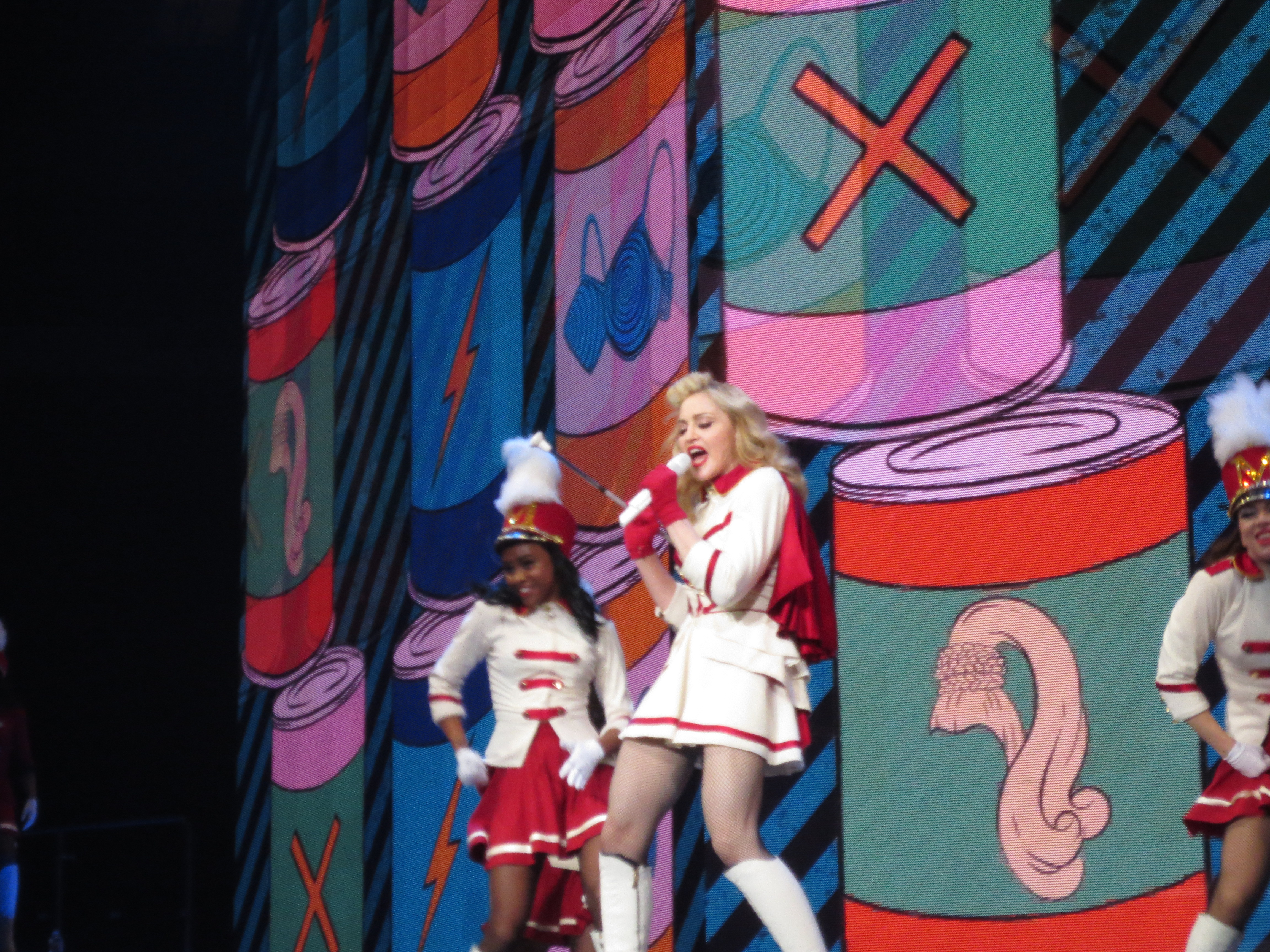 2012 10-25 MDNA Madonna Houston (158)